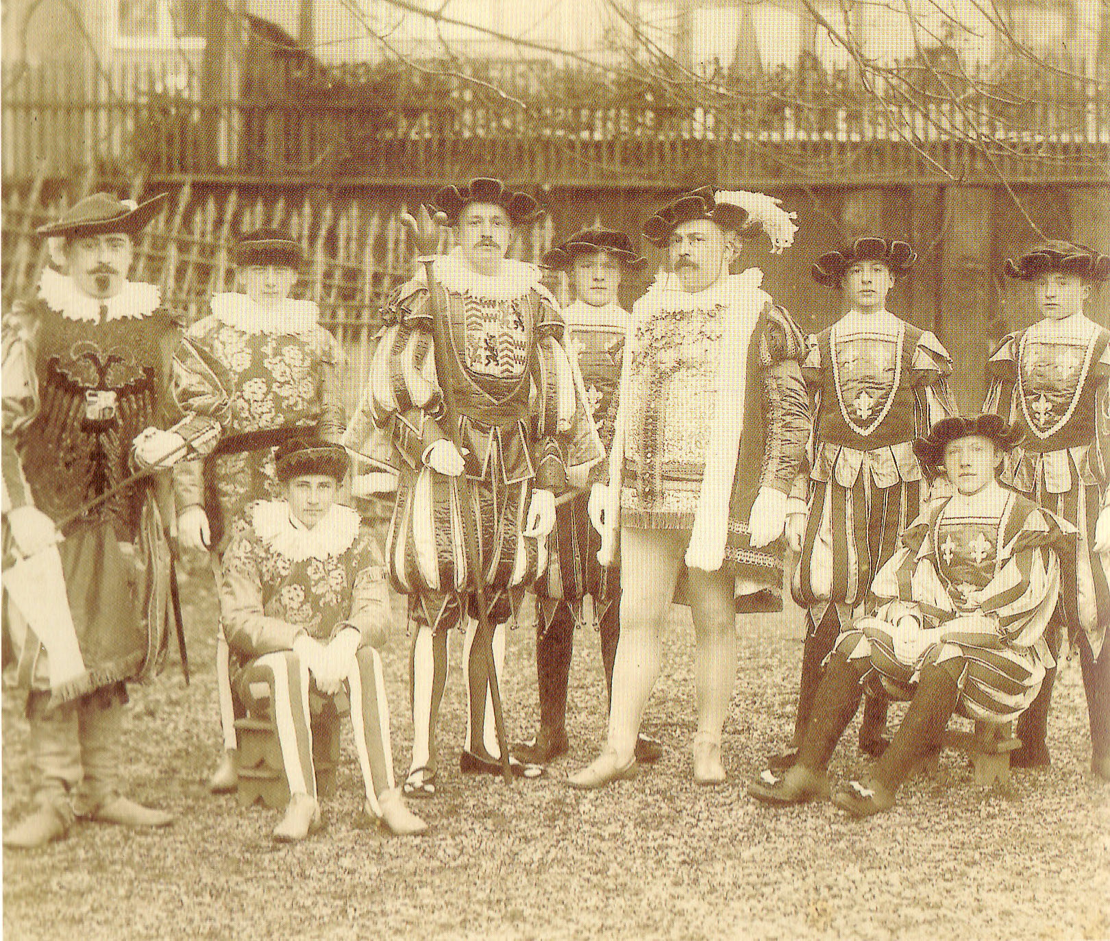 Foto van Prins Amadeiro II (Johan Gostelie) omgeven door zijn pages Licensing